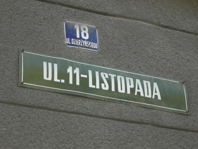 Tabliczki z nazwami ul. 11 Listopada (kamienica nr 18) w Bielsku-Białej, pierwsza - z okresu PRL (ul. Dzierżyńskiego), druga - współczesna